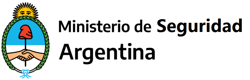 Ministerio de Seguridad